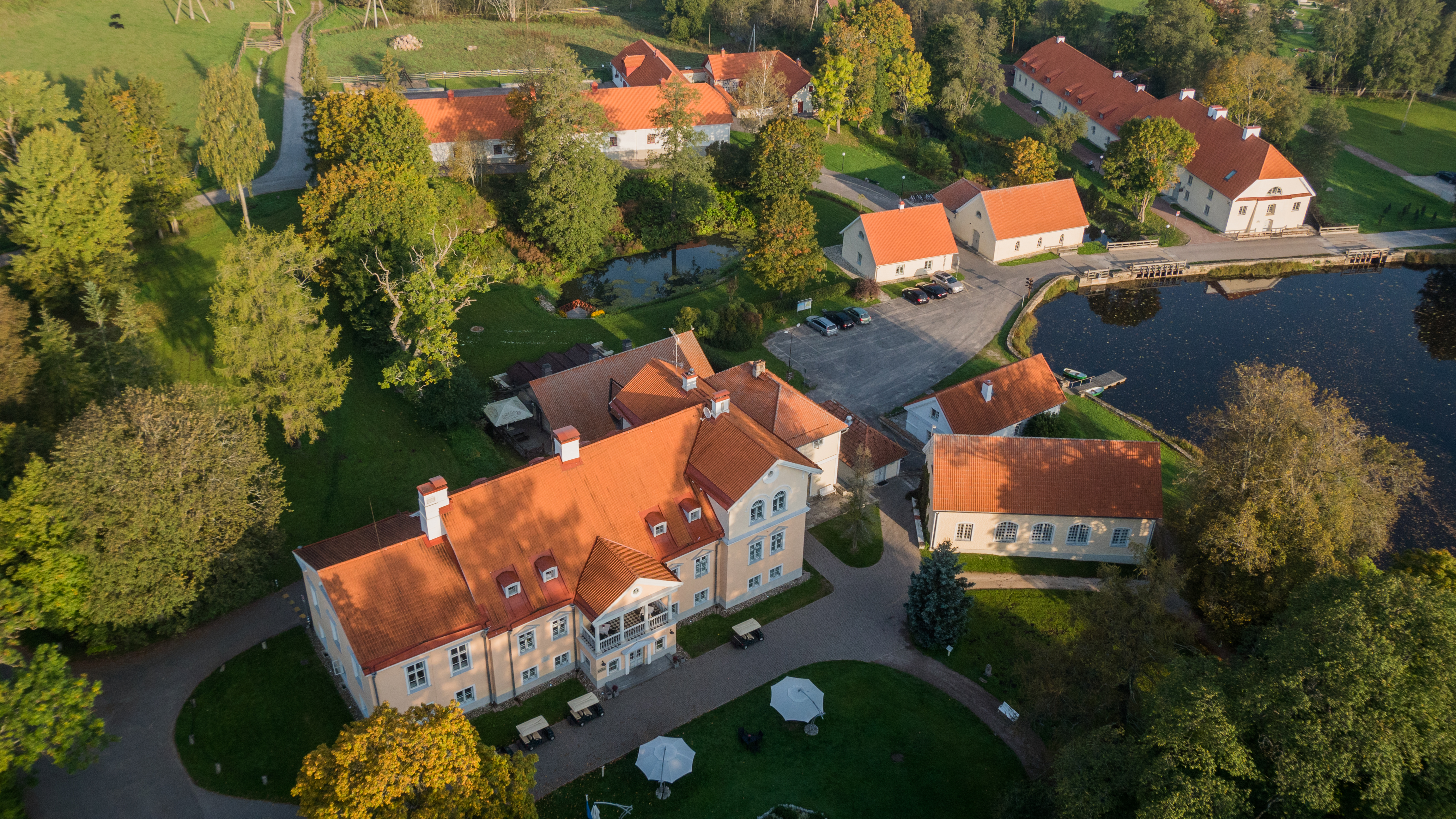 Tagaplaanil paistab ka osaliselt mõisakompleks